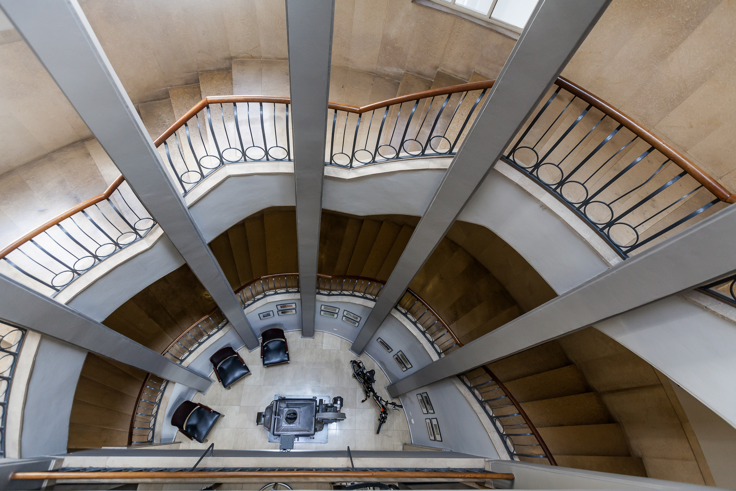 בניין קולנוע אסתר שבתל אביב נבנה בכיכר דיזנגוף בשנים 1938-1939. יזמי הבניין ובעליו היו הזוג אסתר ומשה נתנאל מראשוני יהודי עדן, שעלו לארץ ישראל מהעיר עדן בשנת 1924 והם ומשפחתם (מנחם משה) בנו בעיר כ 25 בניינים שרובם הוכרזו כבתים לשימור.